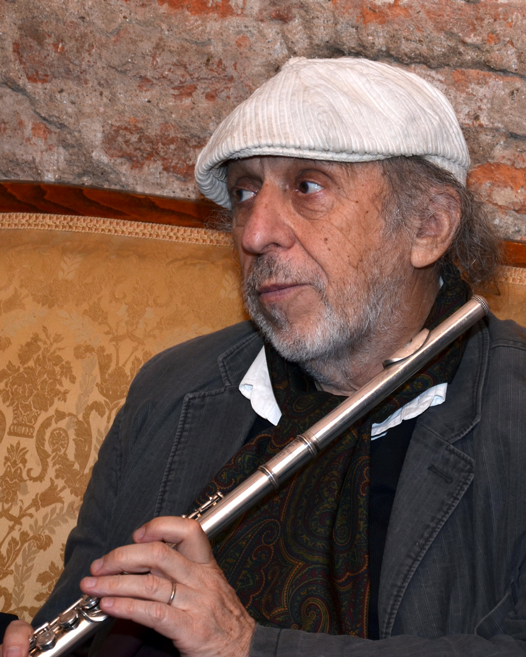 Jiří Stivín, 2015